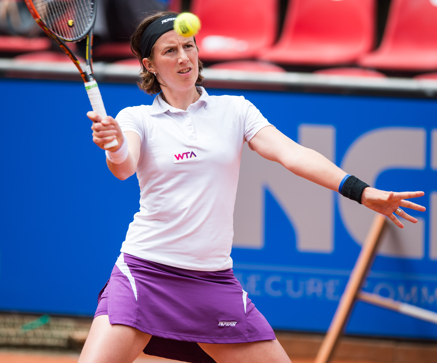 Damentennis,Kristina Barrois,Nürnberger Versicherungscup 2014,Tennis,WTA